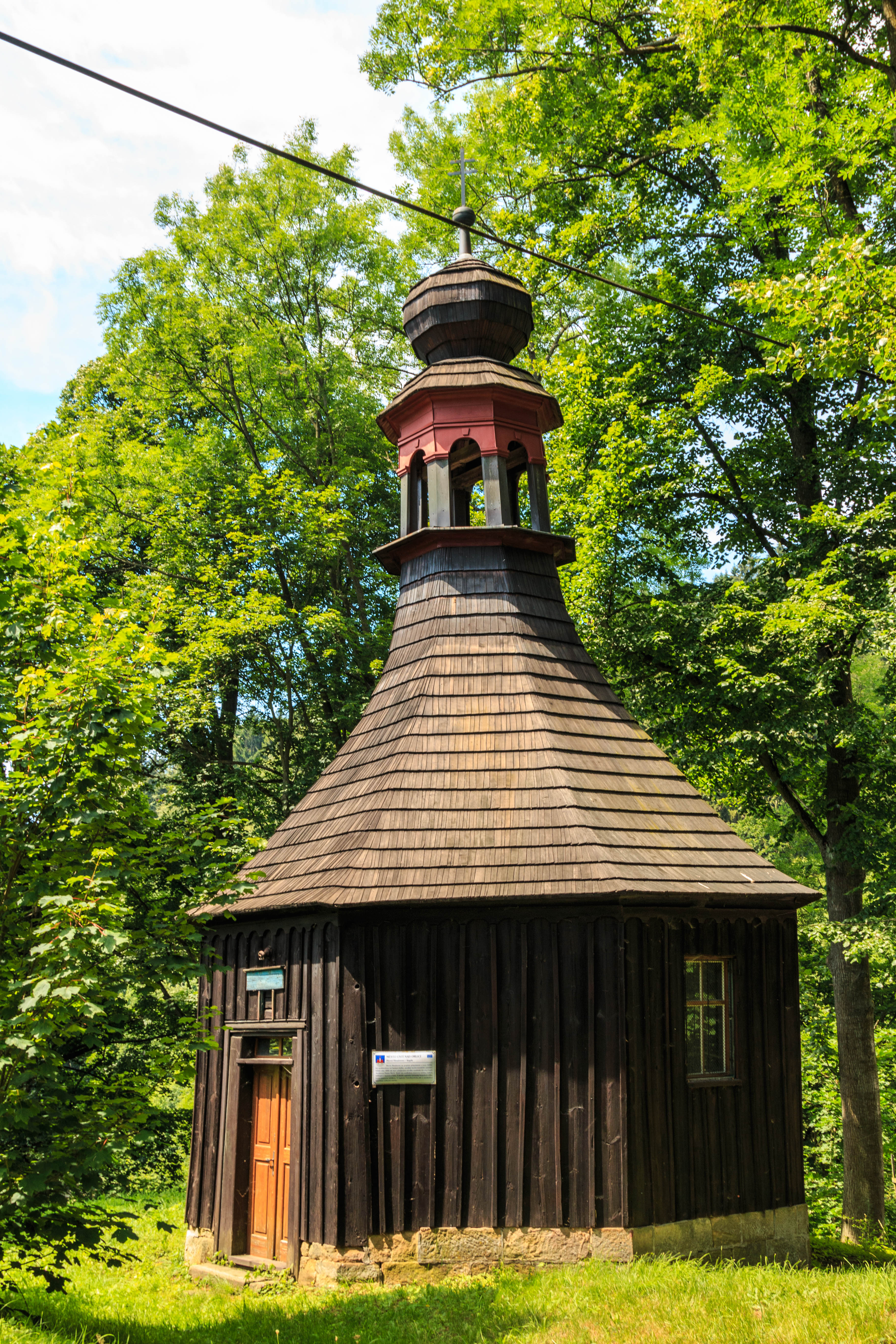 Kostel Navštívení Panny Marie, Horní Houžovec.